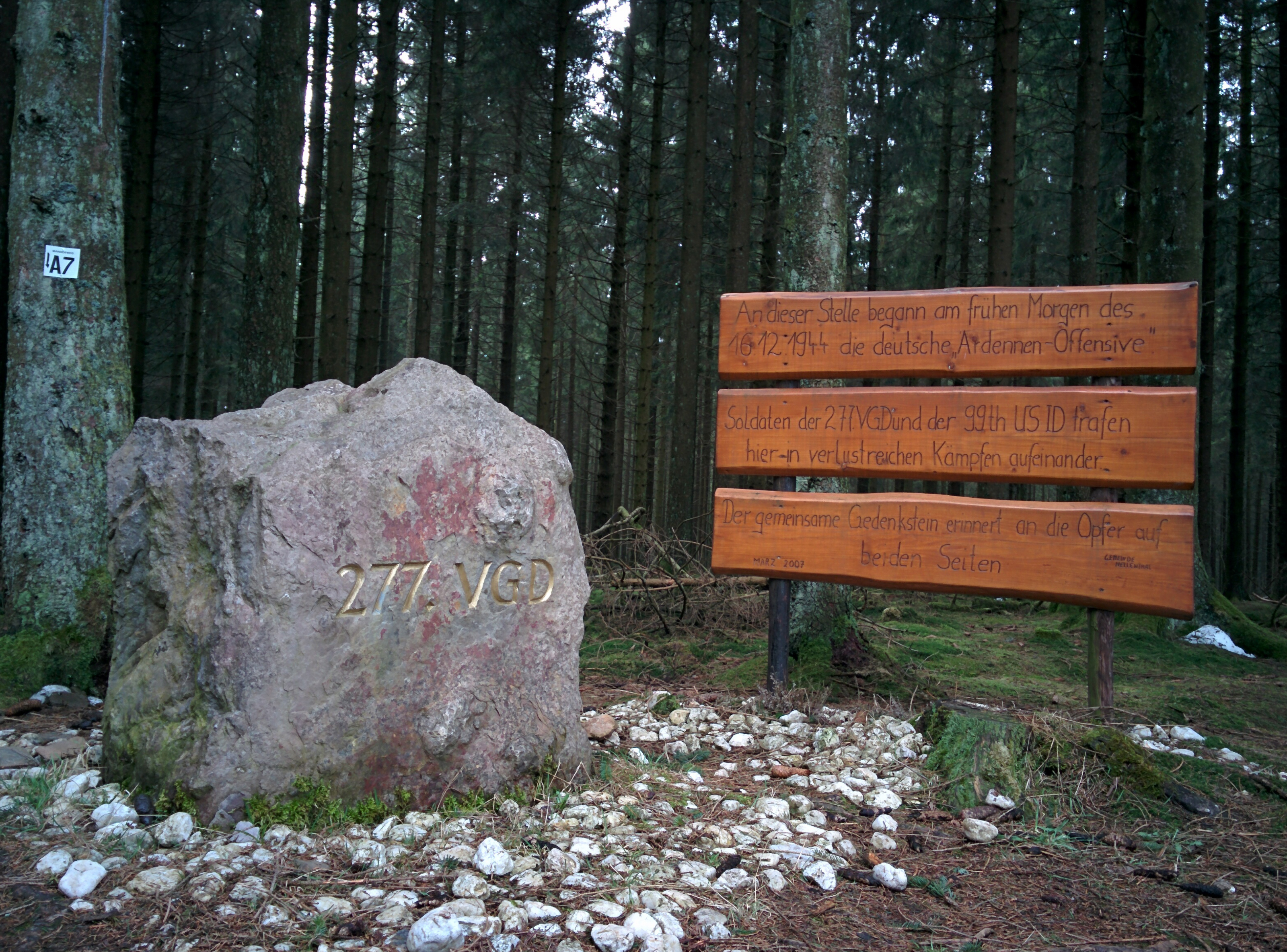 Beidseitiger Gedenkstein zum Ort des Beginns der Ardennenoffensive bei Hollerath